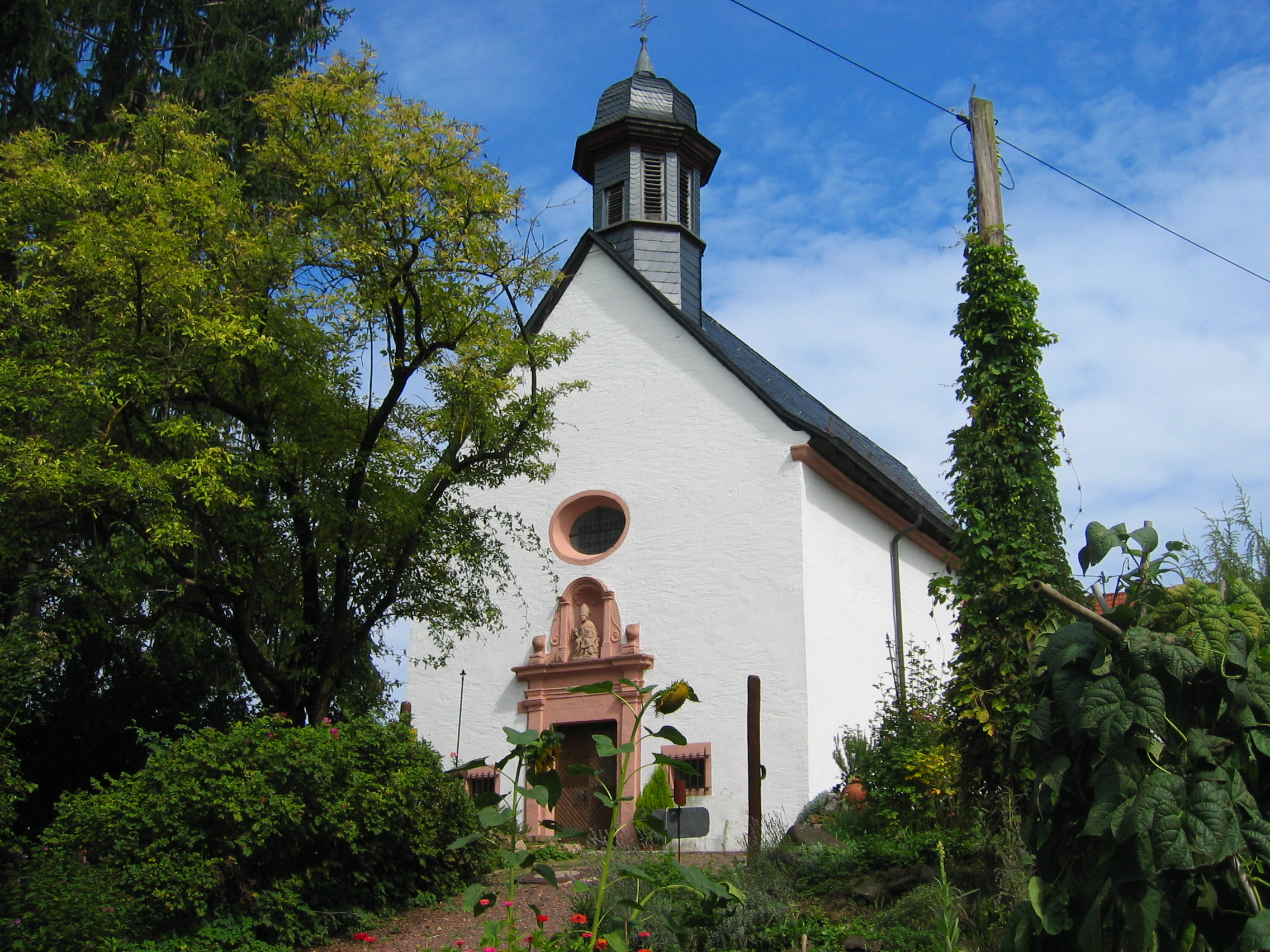 Blasiuskapelle Bergweiler, Gemeinde Tholey, Saarland